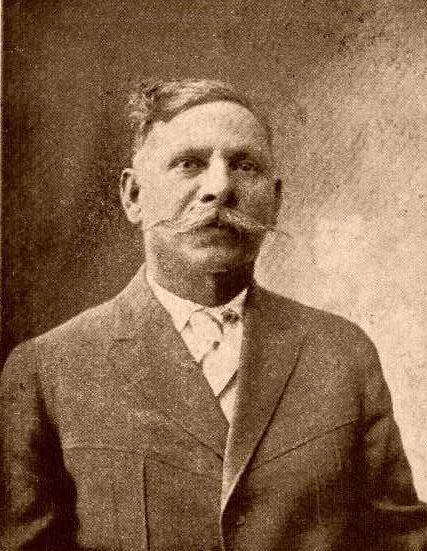 General Rosalío Hernández